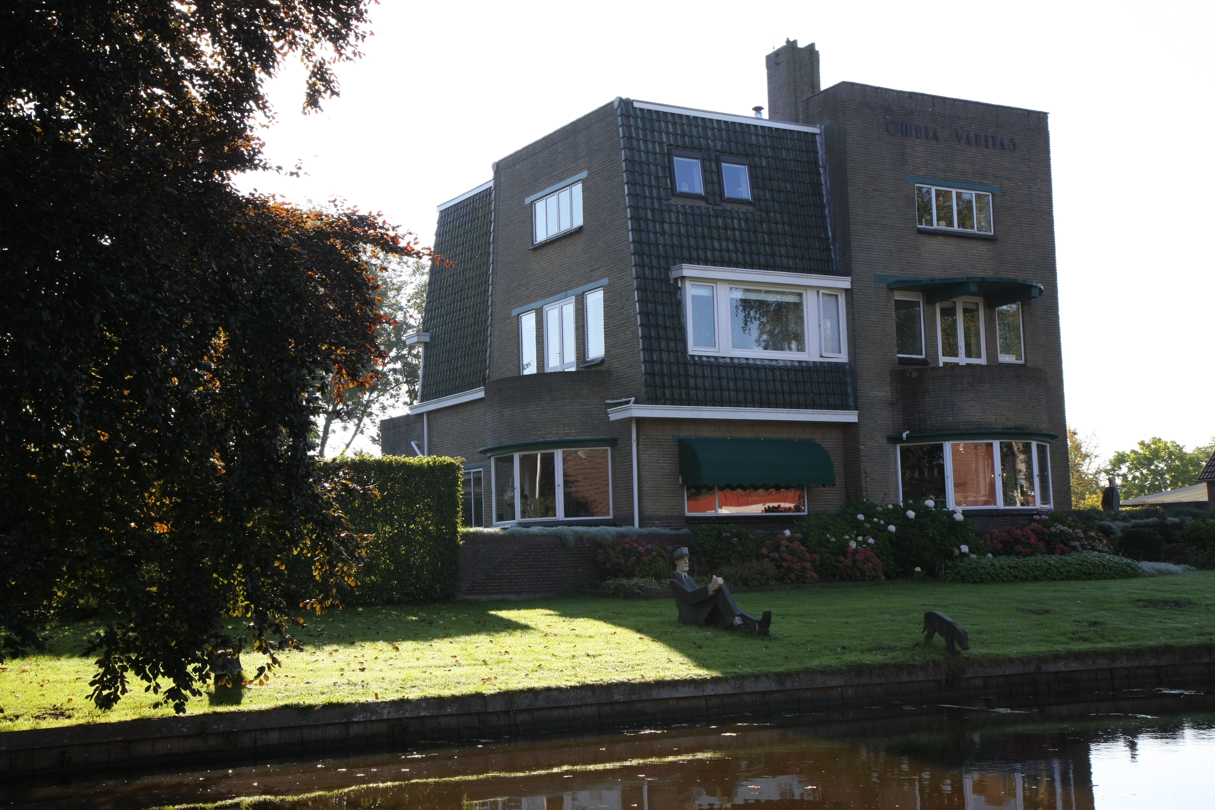 Dienstwoning te Wildervank